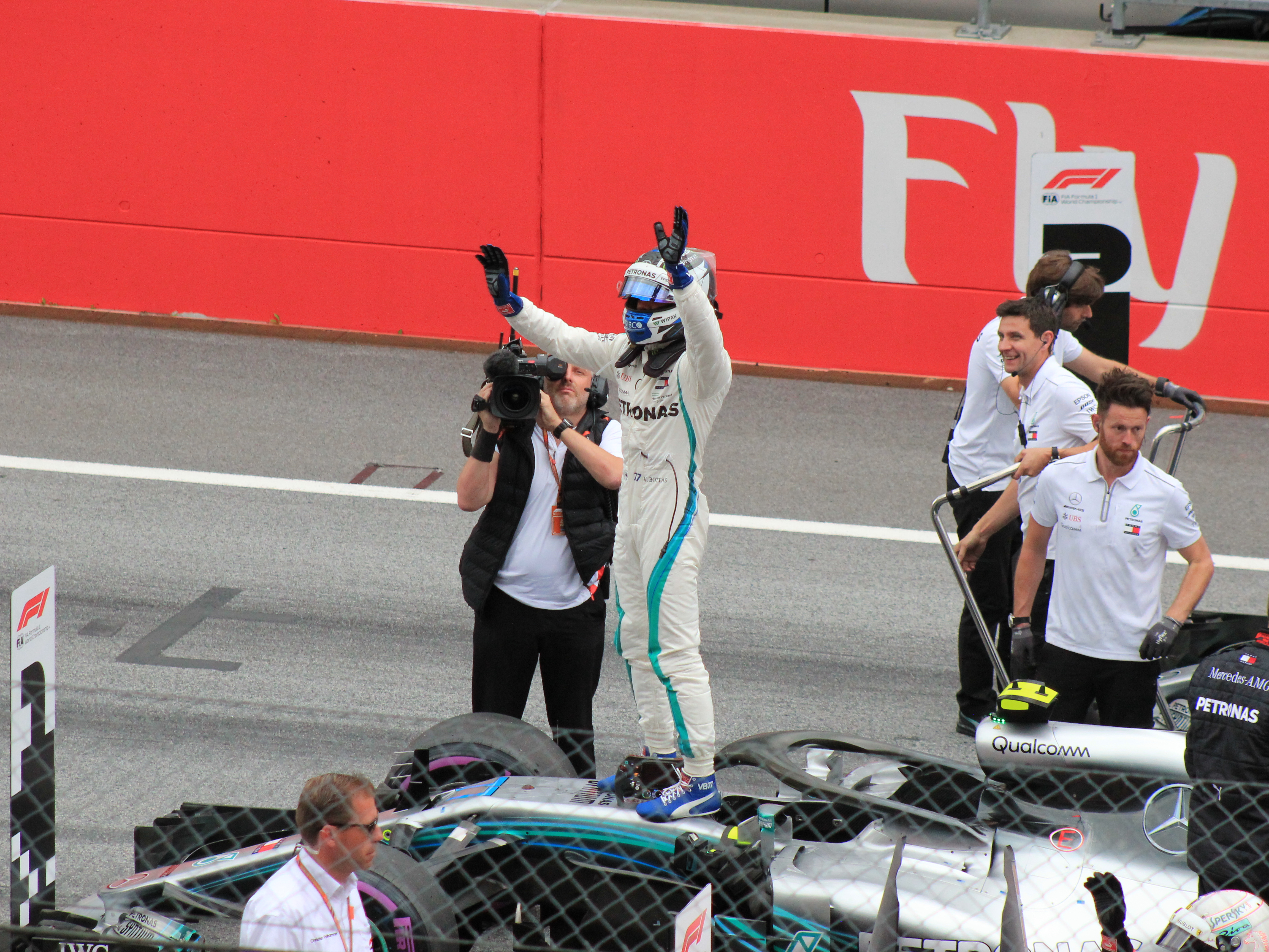 Bottas nach dem Qualifying